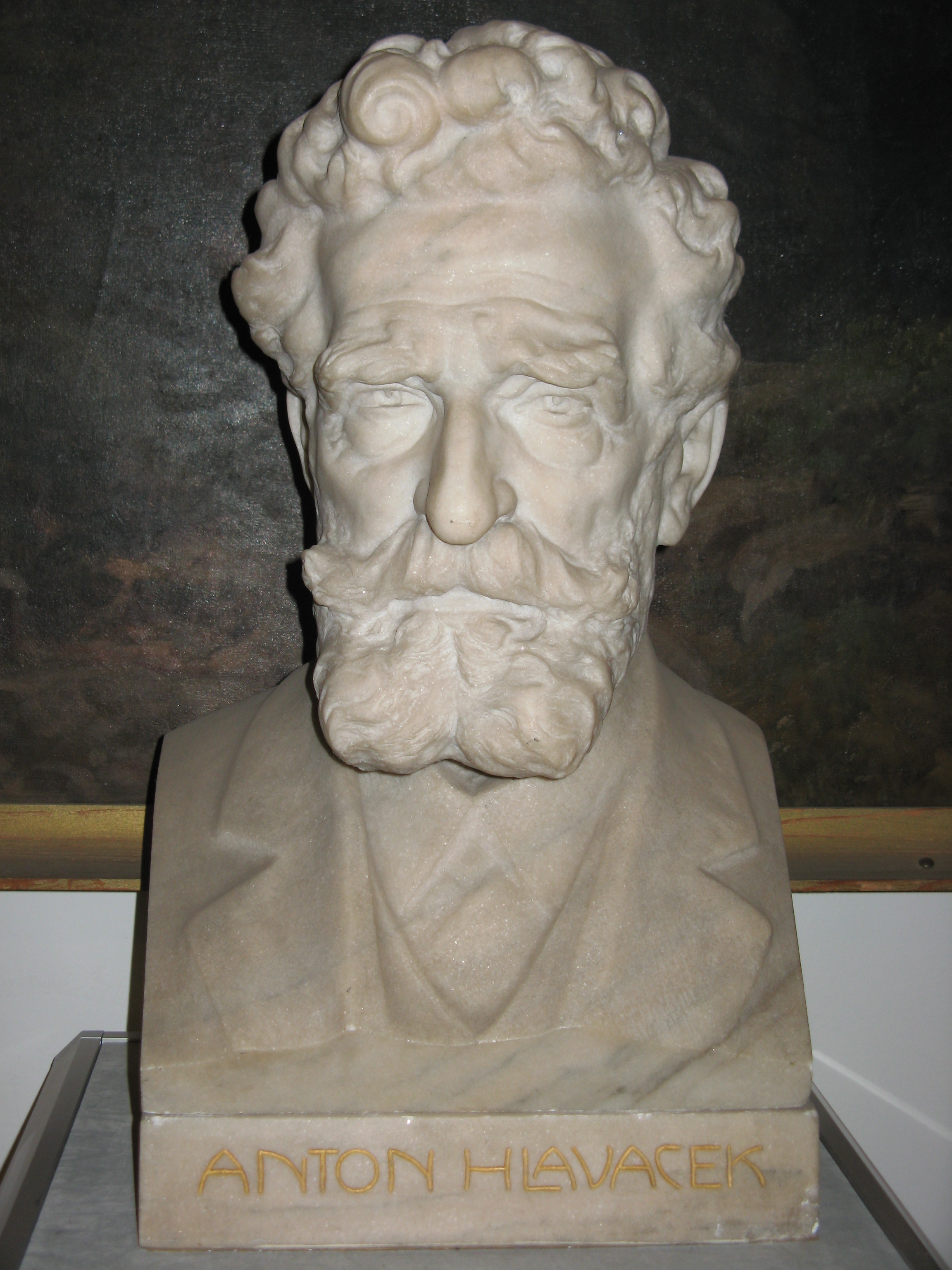 Büste des Malers Anton Hlavacek von Fritz Hänlein (1925), Marmor, Bezirksmuseum Meidling, Längenfeldgasse 13-15, Wien-Meidling